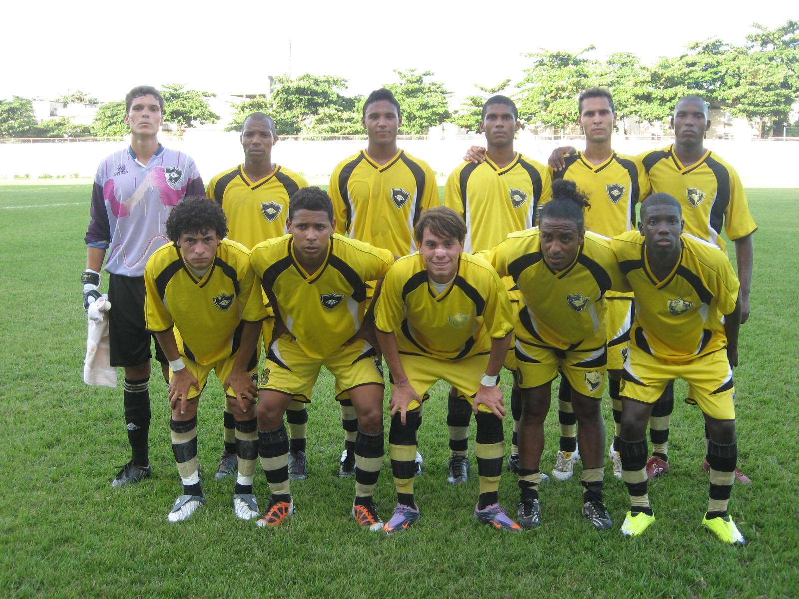 Equipe profissional do União de Marechal Hermes em 2011.